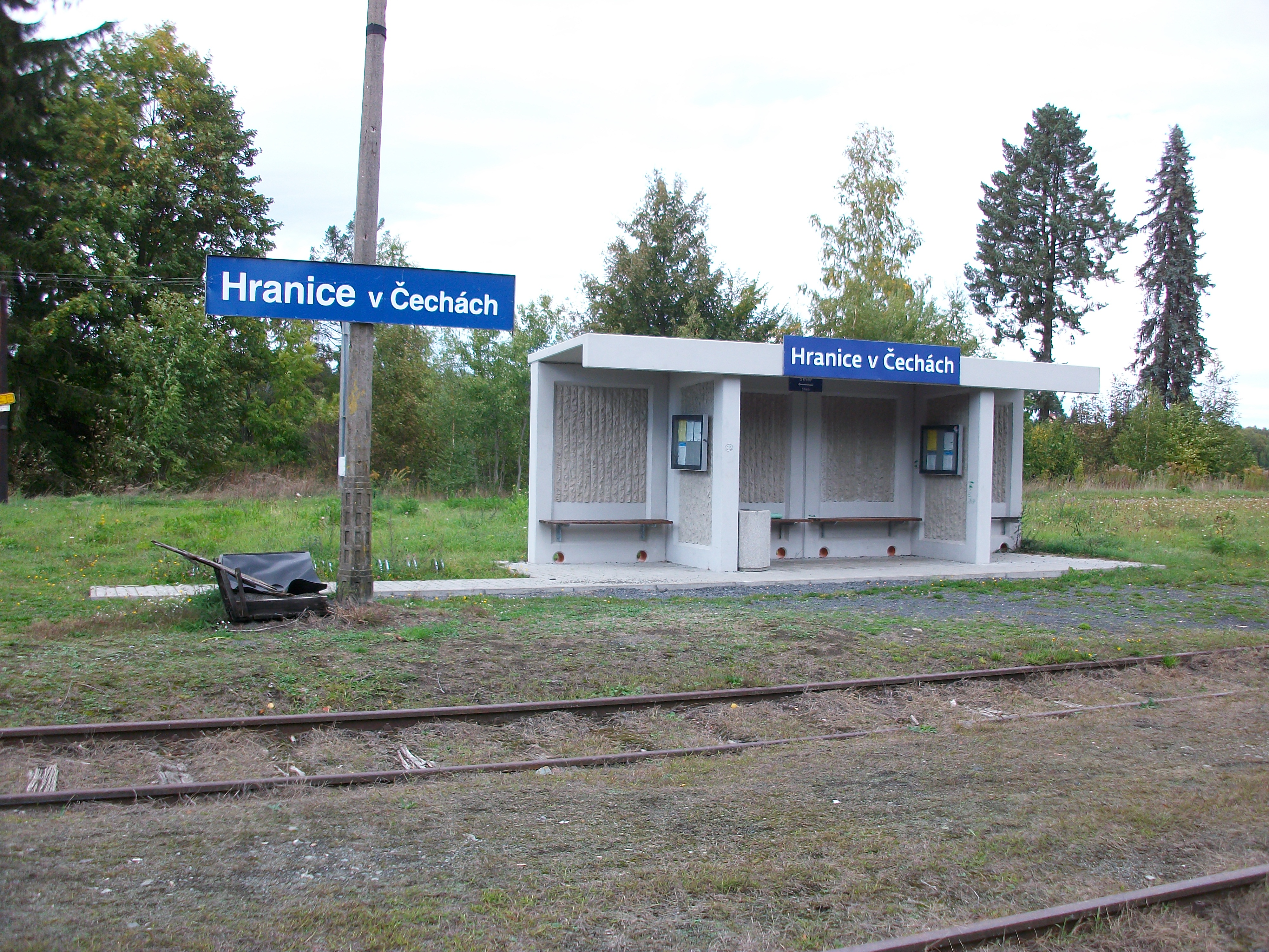 Bahnhof Hranice v Čechách (Roßbach), Wartehalle (2019)